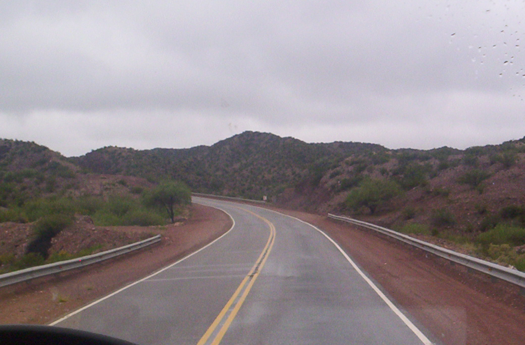 Vista a la Ruta Nacional 141, antes del empamlme con la ruta provincia 510, en la provincia de San Juan, Argentina